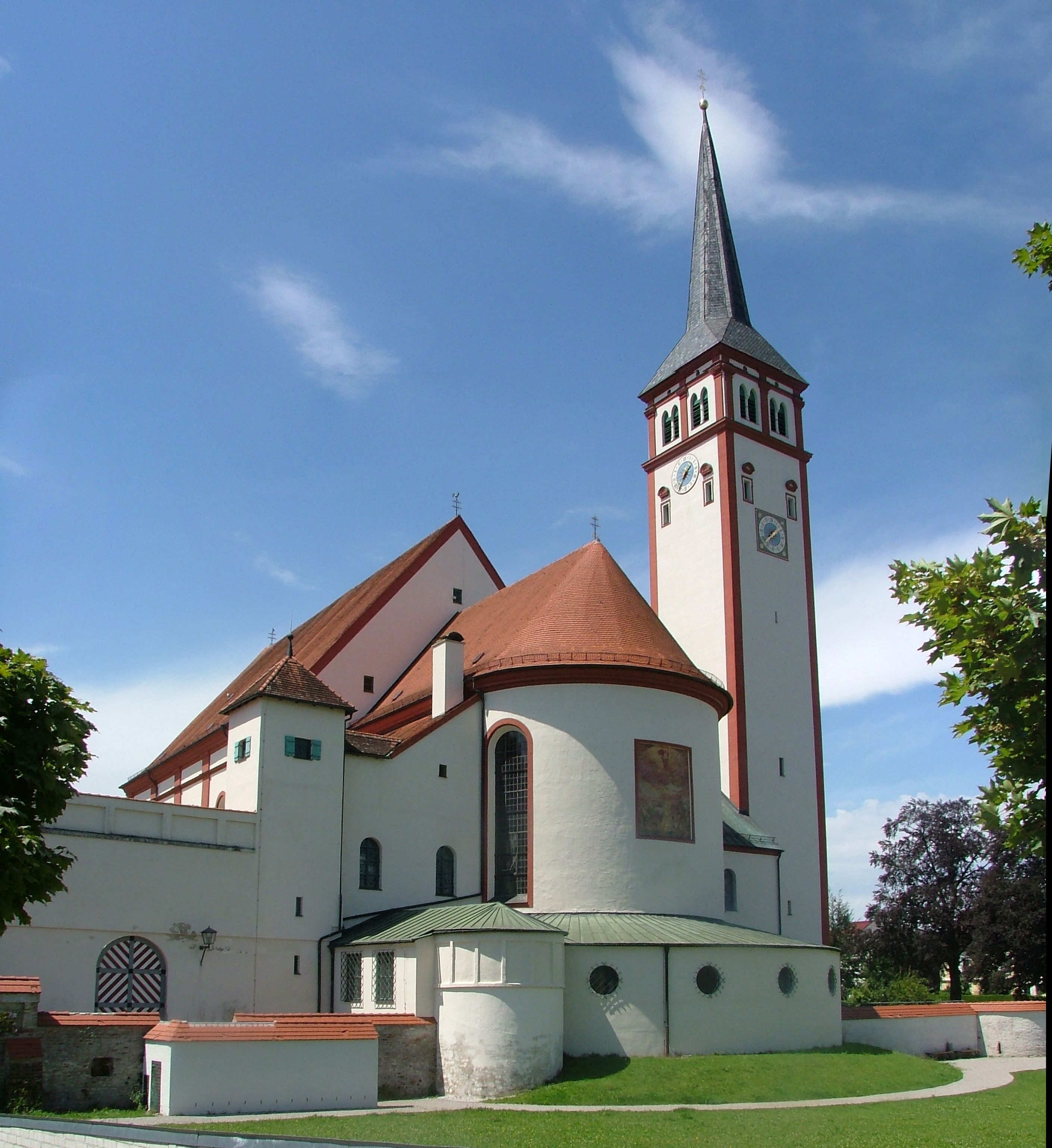 Stadtkirche